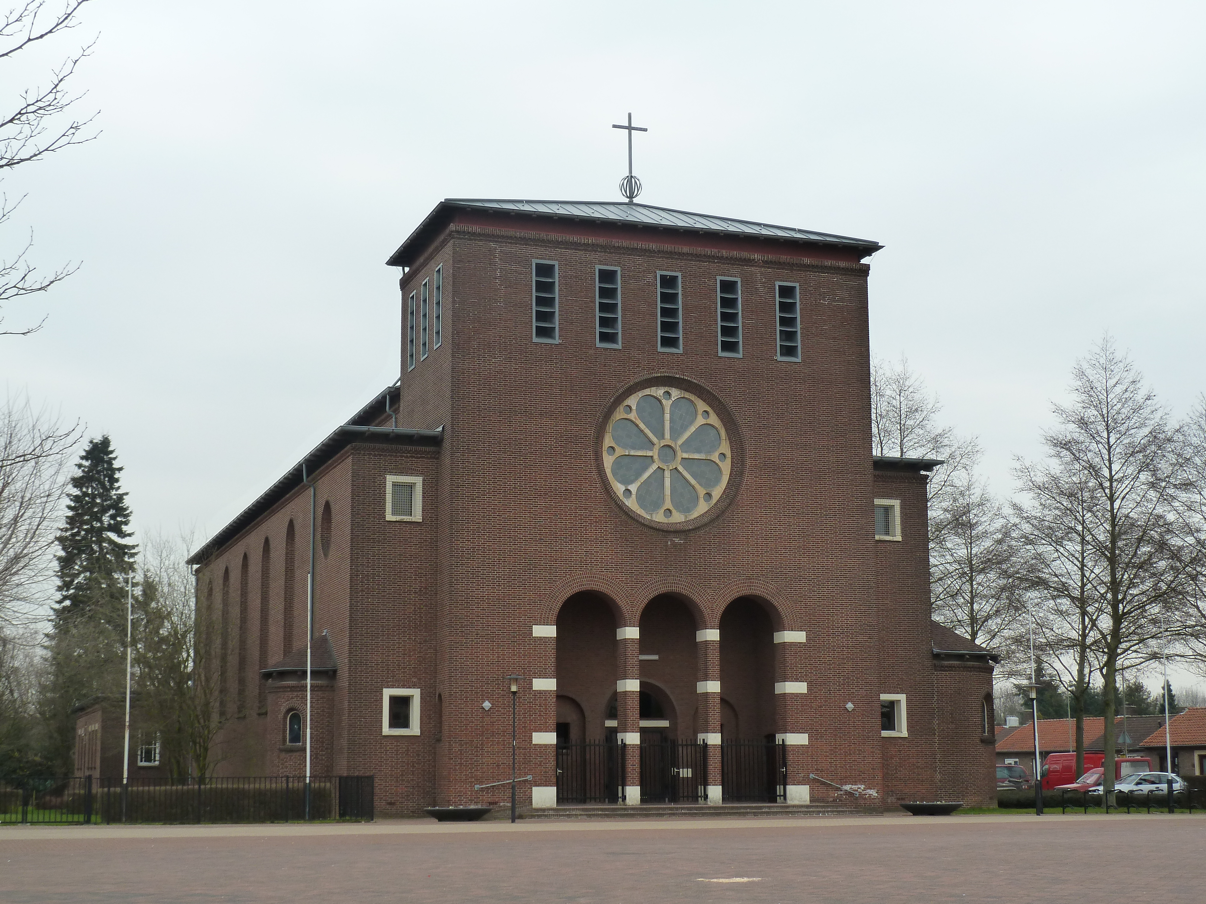 Onze-Lieve-Vrouw Hulp der Christenenkerk in de wijk Nieuwdorp, Stein, Limburg, Nederland